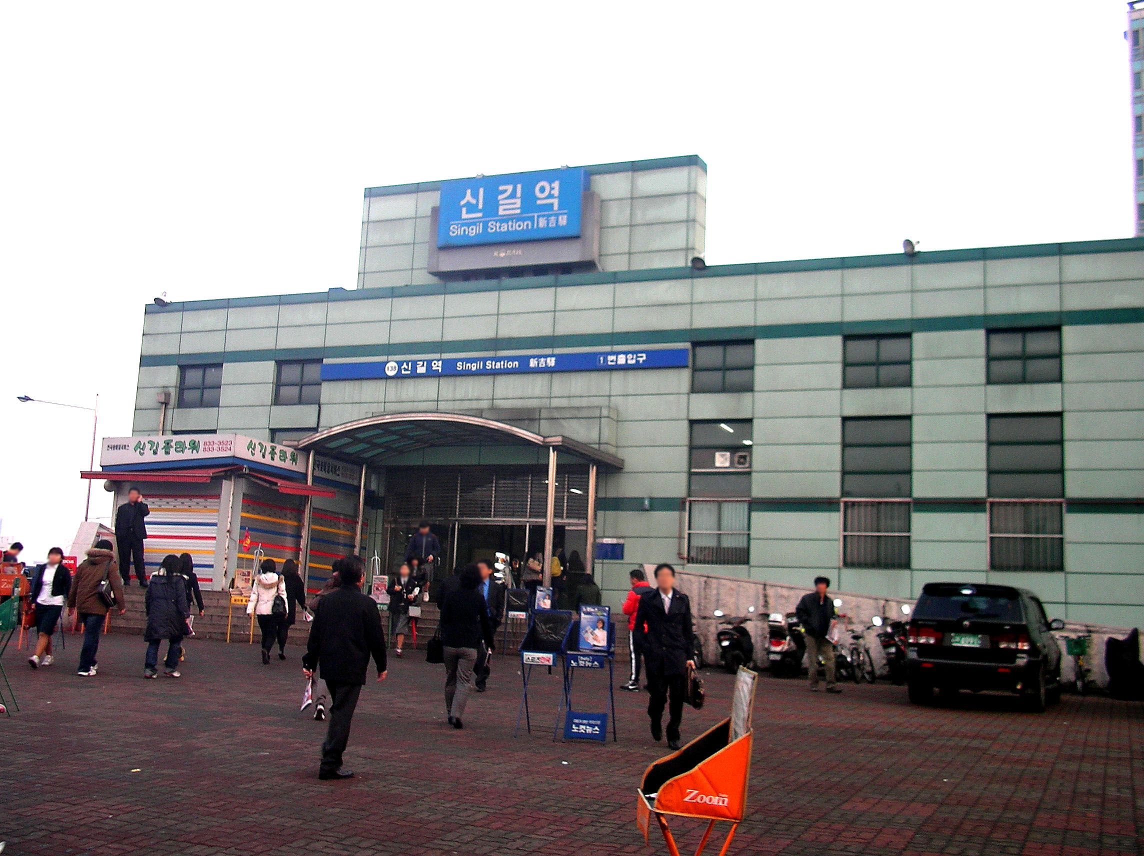 Singil Station (ko en ja)